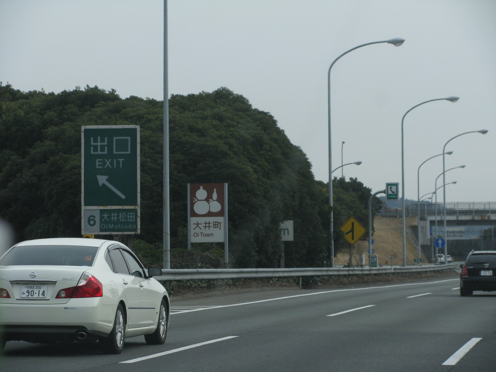 2008年3月2日、大井松田IC付近で撮影。奥が東京方面